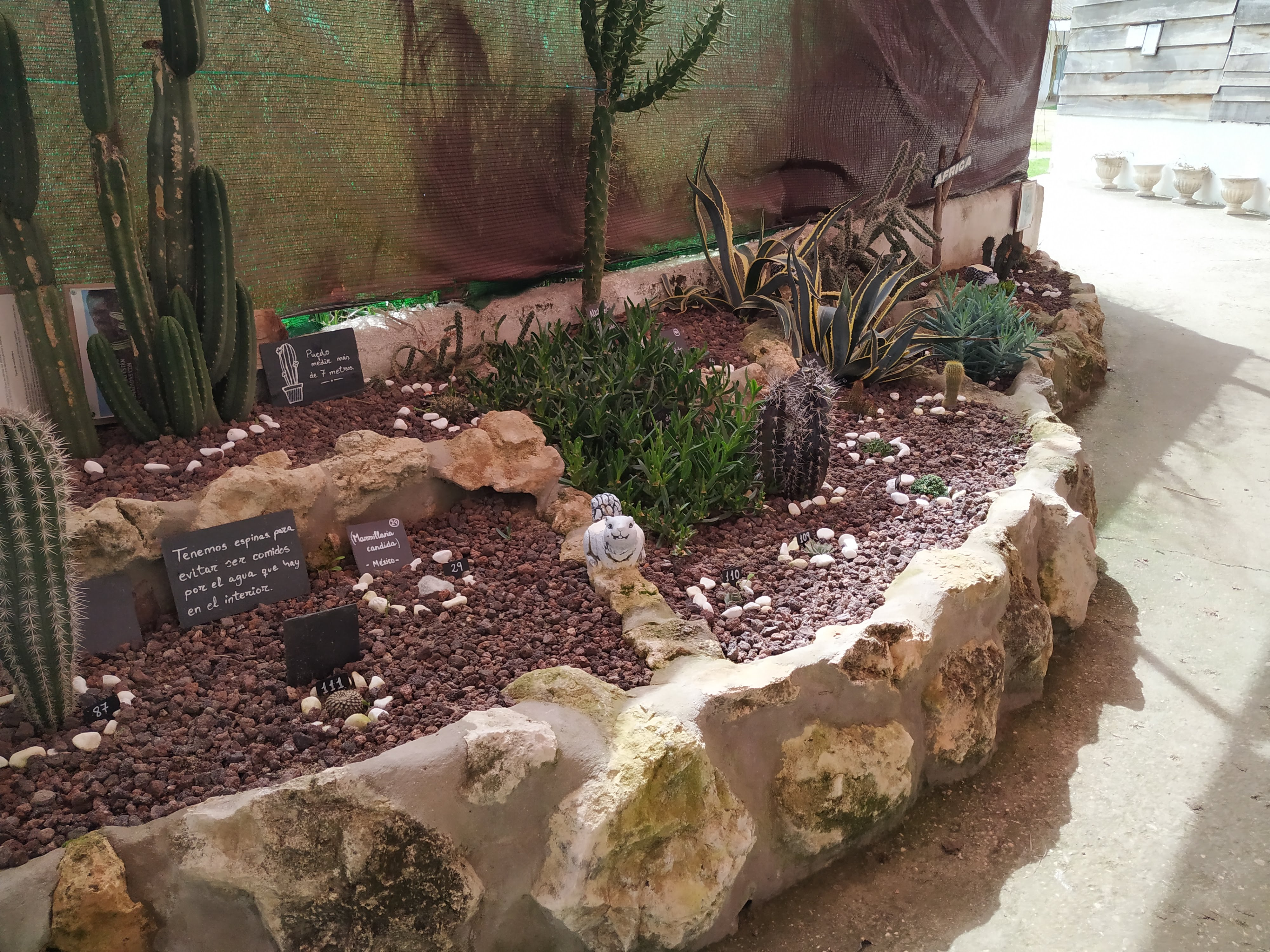 El Cactarium